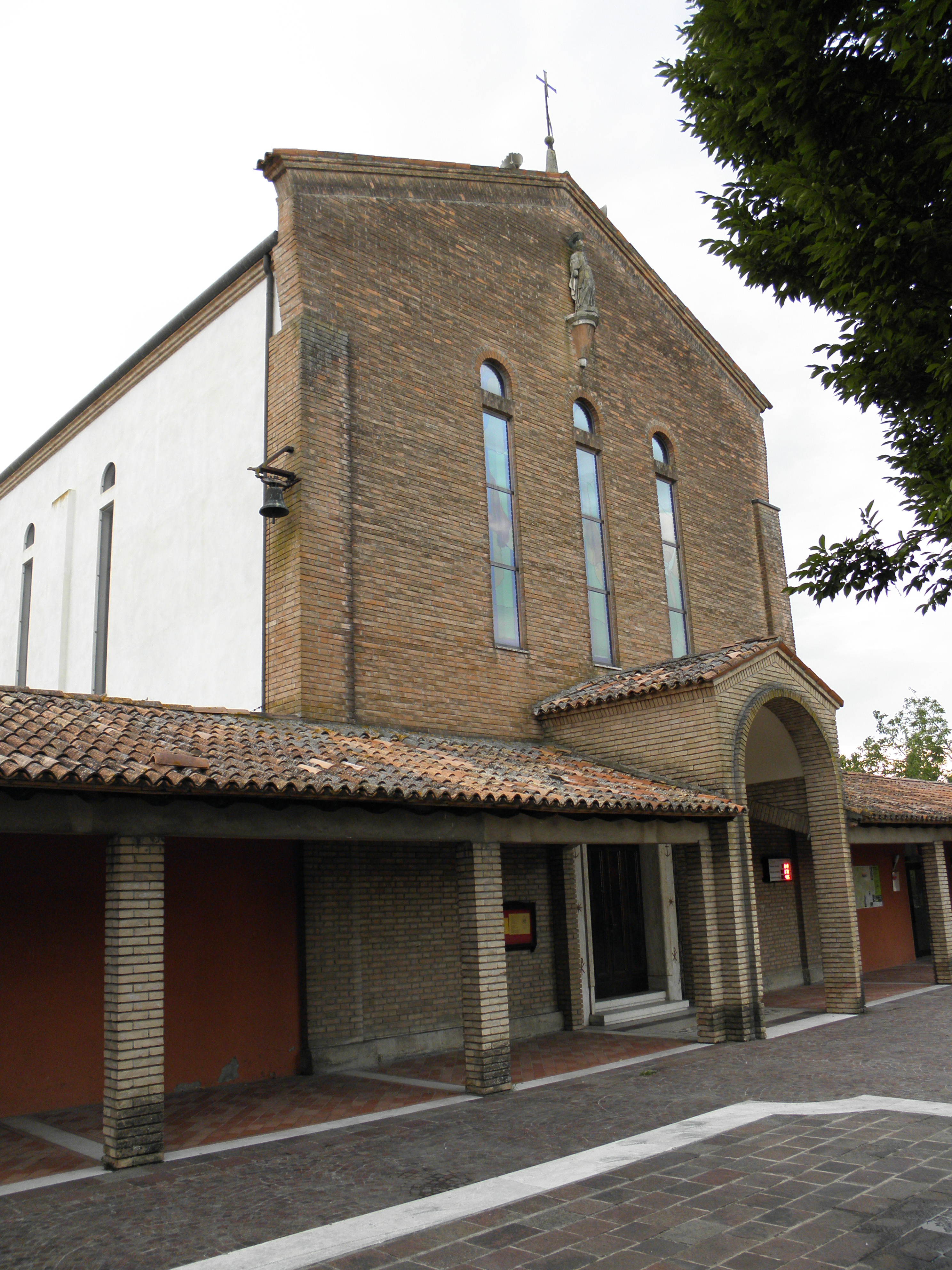 Altino, frazione di Quarto d'Altino: la chiesa parrocchiale di San Eliodoro.